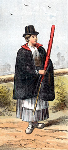 Overwegwachteres uit 1889, met rode vlag. Repro uit het gedenkboek van de HIJSM, 1839-1889.